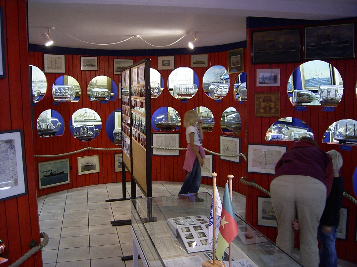 Innenansicht des Buddelschiffmuseums in Neuharlingersiel mit einer Sonderausstellung mit Dokumenten zur Handelsschiffahrt.